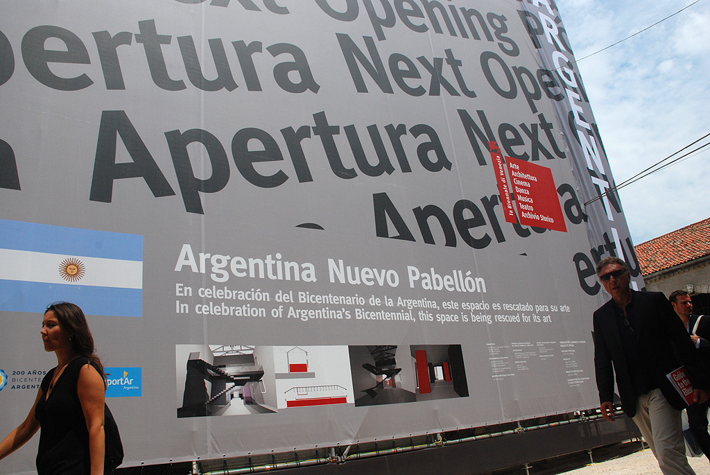 Sobre la derecha de la foto, se observa el futuro Pabellón permanente de la Argentina. La firma de convenio de uso se realizará entre la Fundación Exportar y la Biennale di Venezia el 3 de junio con la presencia de la presidenta Cristina Fernández de Kirchner.